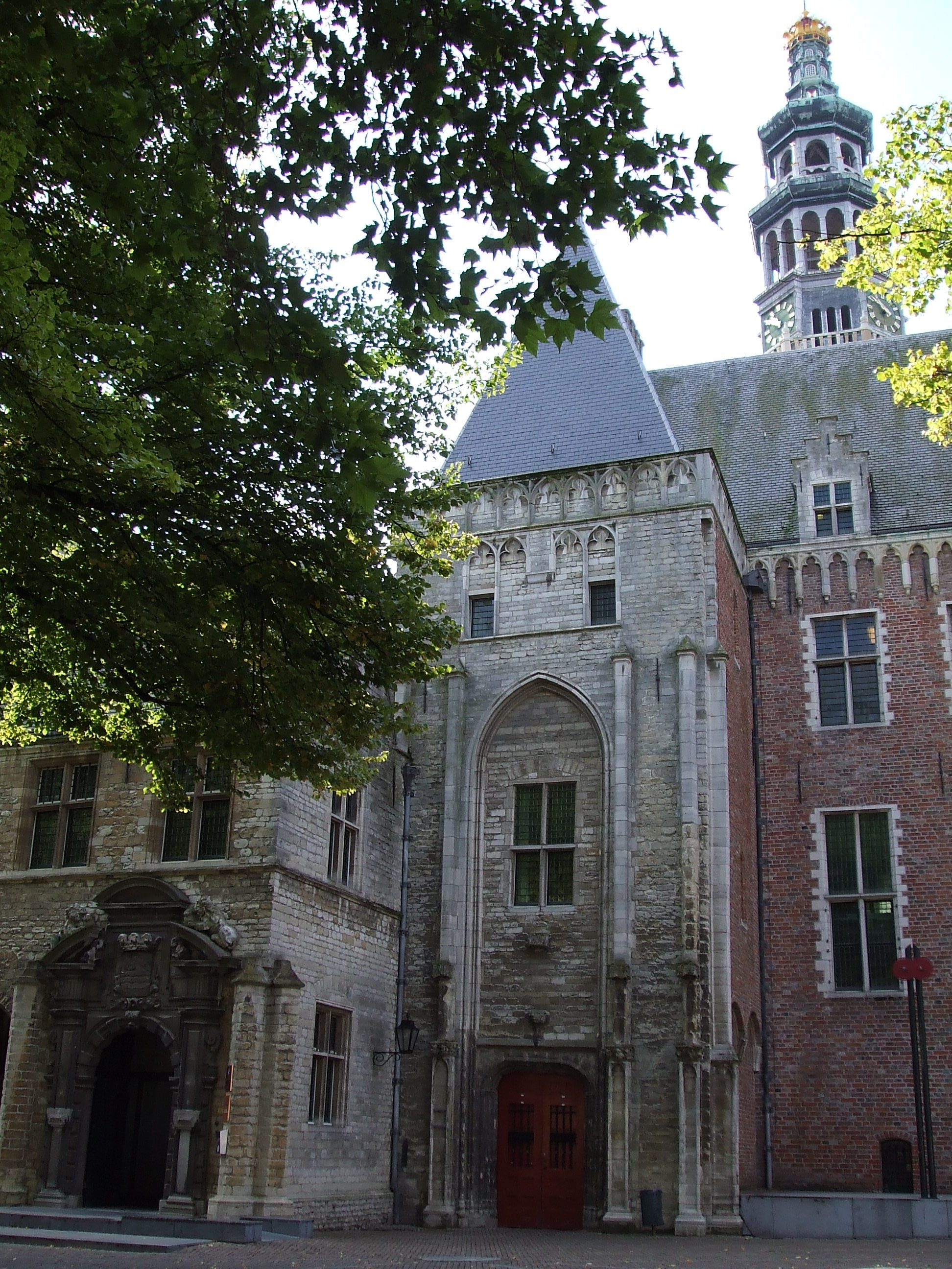 Zicht op de ingang in een deel van de Abdij waarin het Roosevelt Study Center gevestigd is